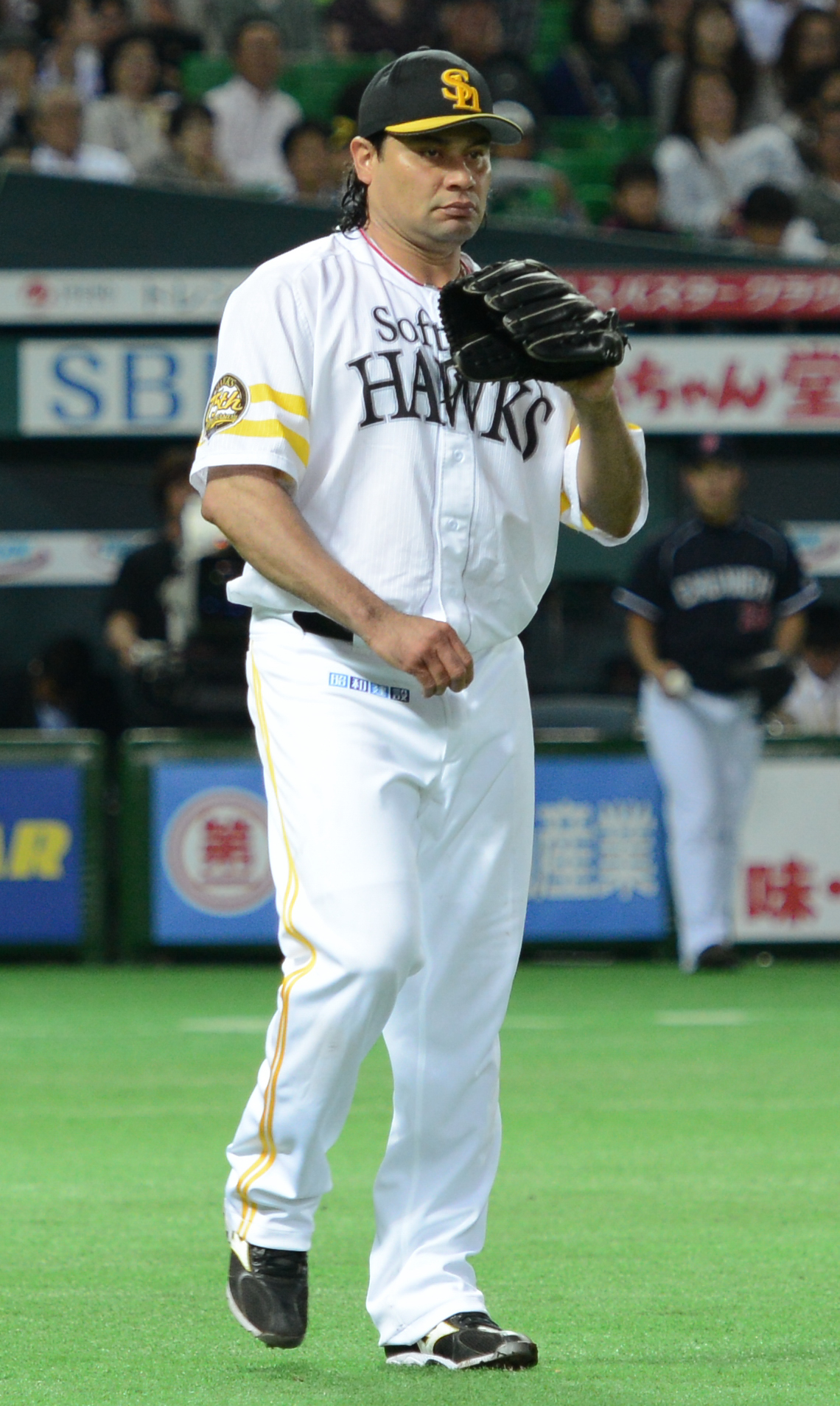 ビセンテ・デ・ラ・クルーズ・パディーヤ（Vicente de la Cruz Padilla ）福岡ソフトバンクホークスに所属するプロ野球選手（投手）。